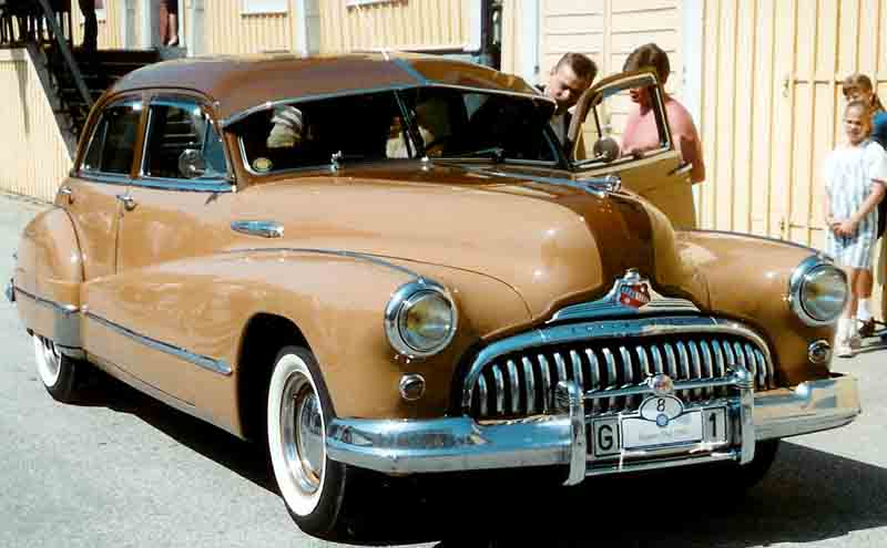 Buick Super Series 50 Model 51 4-Door Sedan